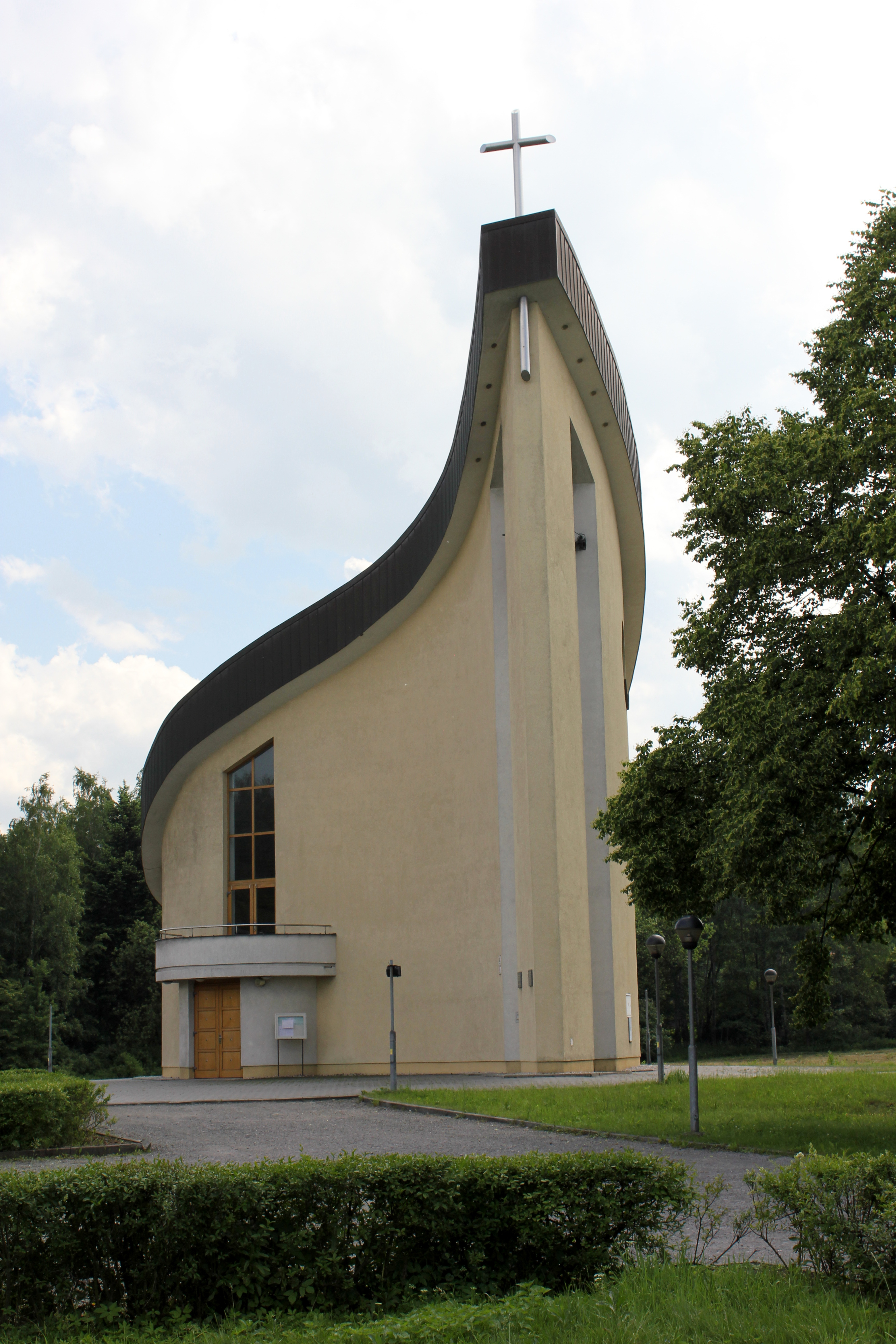 Nový kostel sv. Barbory, pohled zepředu.